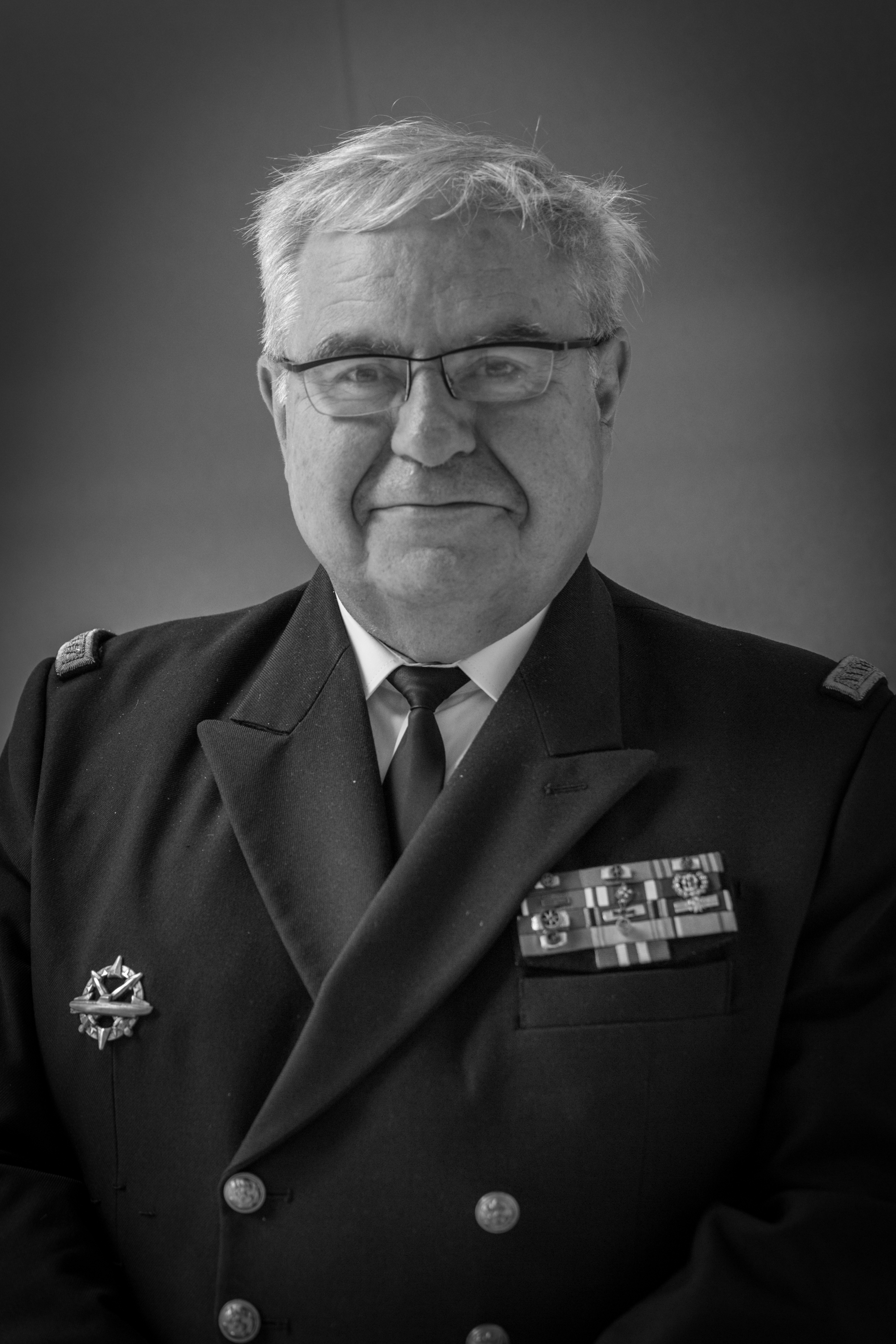 Bernard Rogel par Claude Truong-Ngoc septembre 2015.jpg